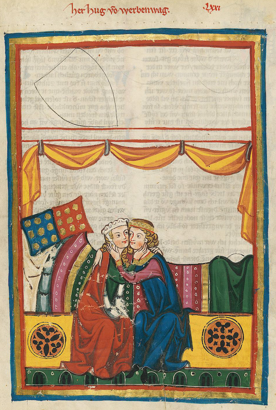 Codex Manesse, UB Heidelberg, Cod. Pal. germ. 848, fol. 252r: Herr Hug von Werbenwag